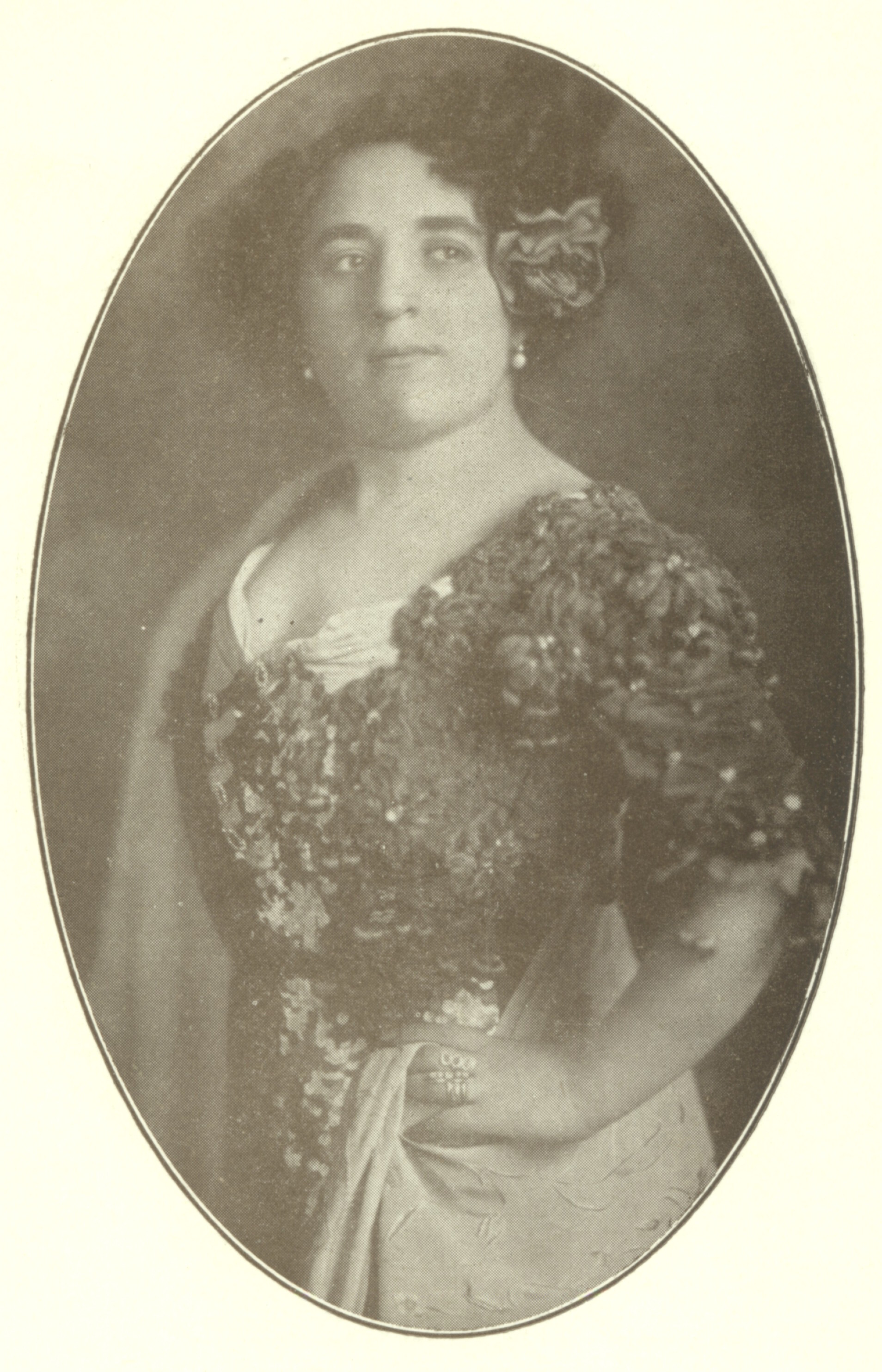 Porträt der Kammersängerin Ottilie Metzger-Lattermann, aus einem Konzertprogramm vom 5. Januar 1917